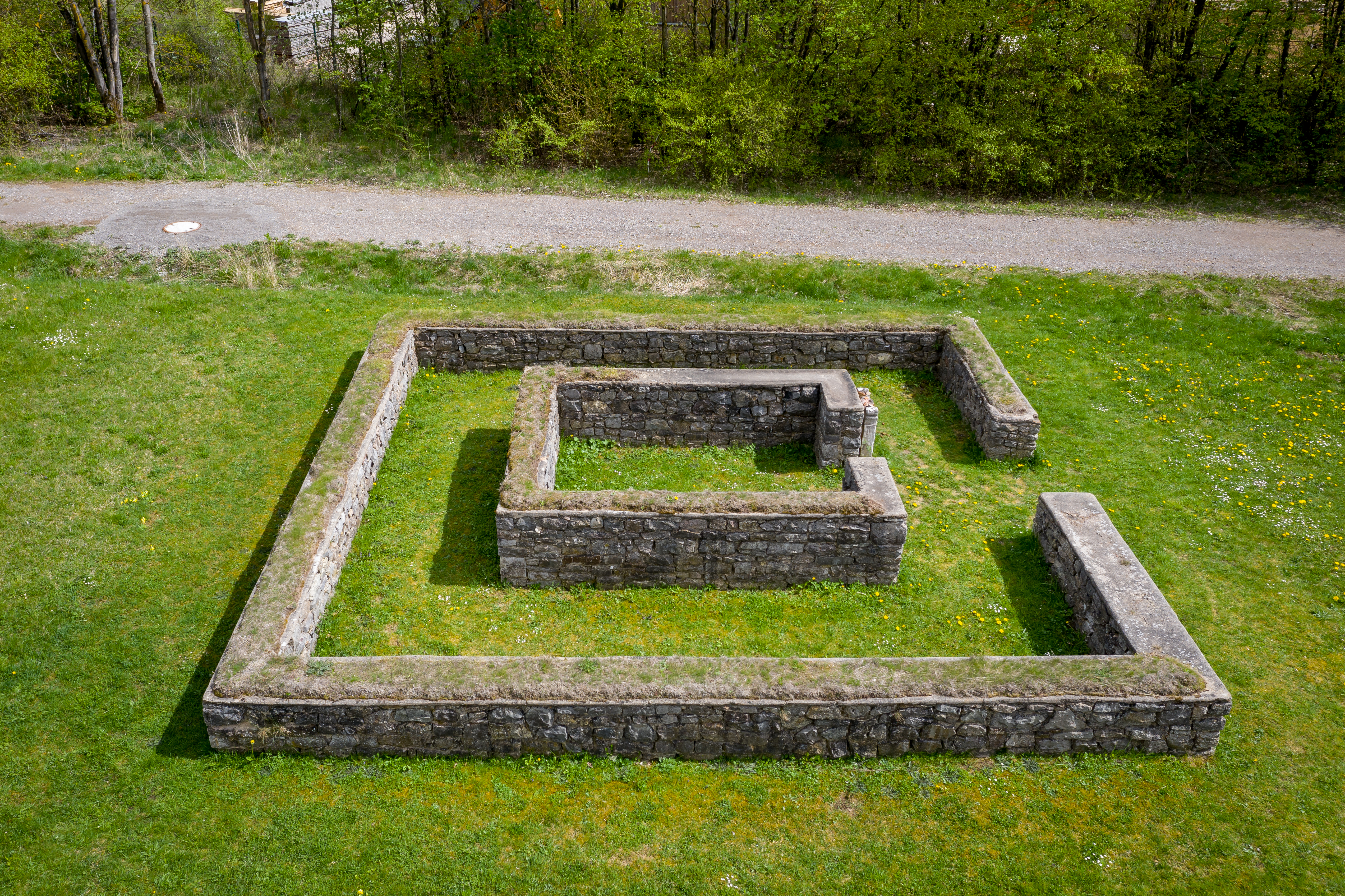 Tempelheiligtum Zingsheim aus der Luft